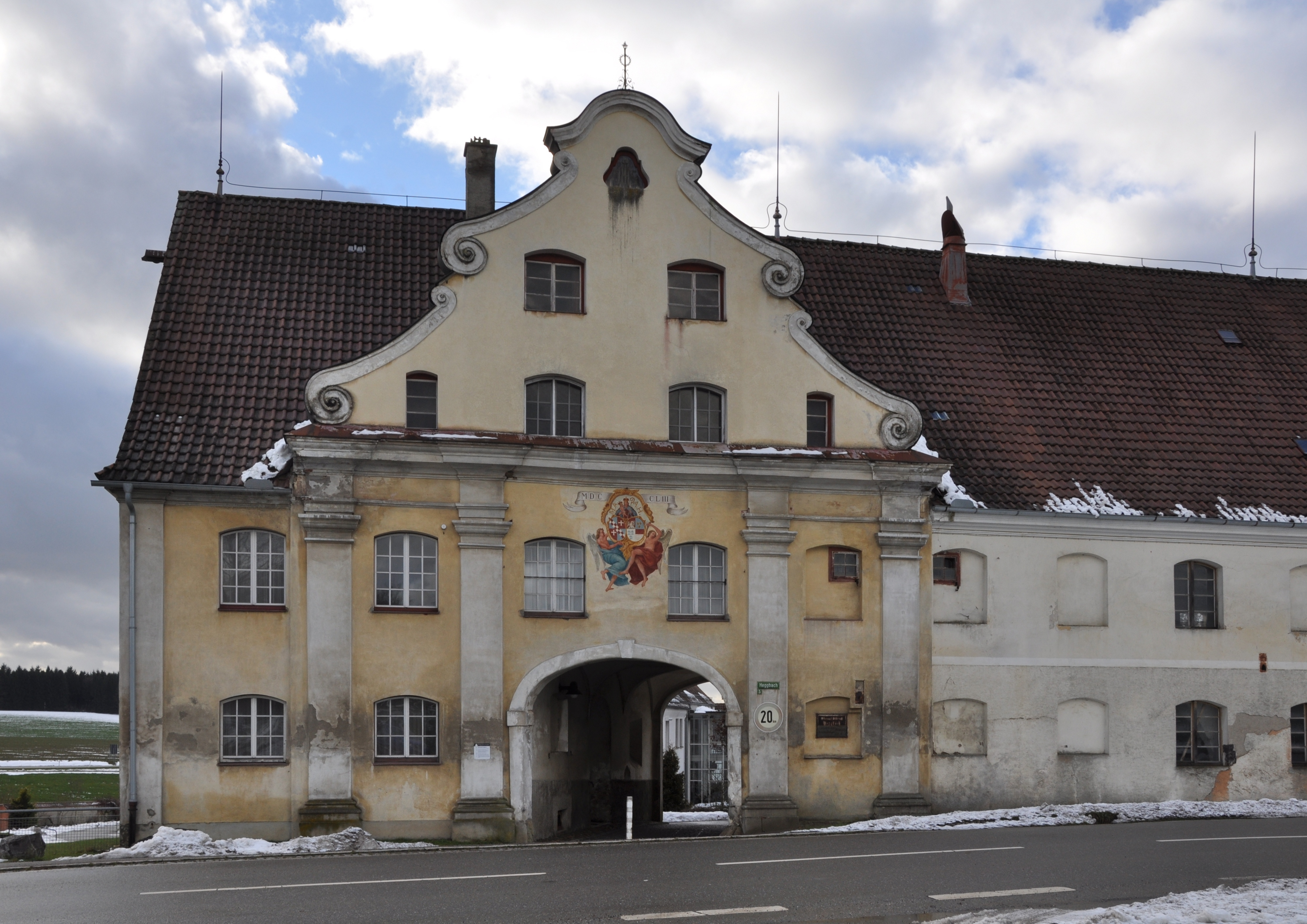 Ehemaliges Kloster Heggbach (Gemeinde Maselheim, Landkreis Biberach), heute Wohn- und Werkstattverbund ders Bereichs Behindertenhilfe der St. Elisabeth-Stiftung